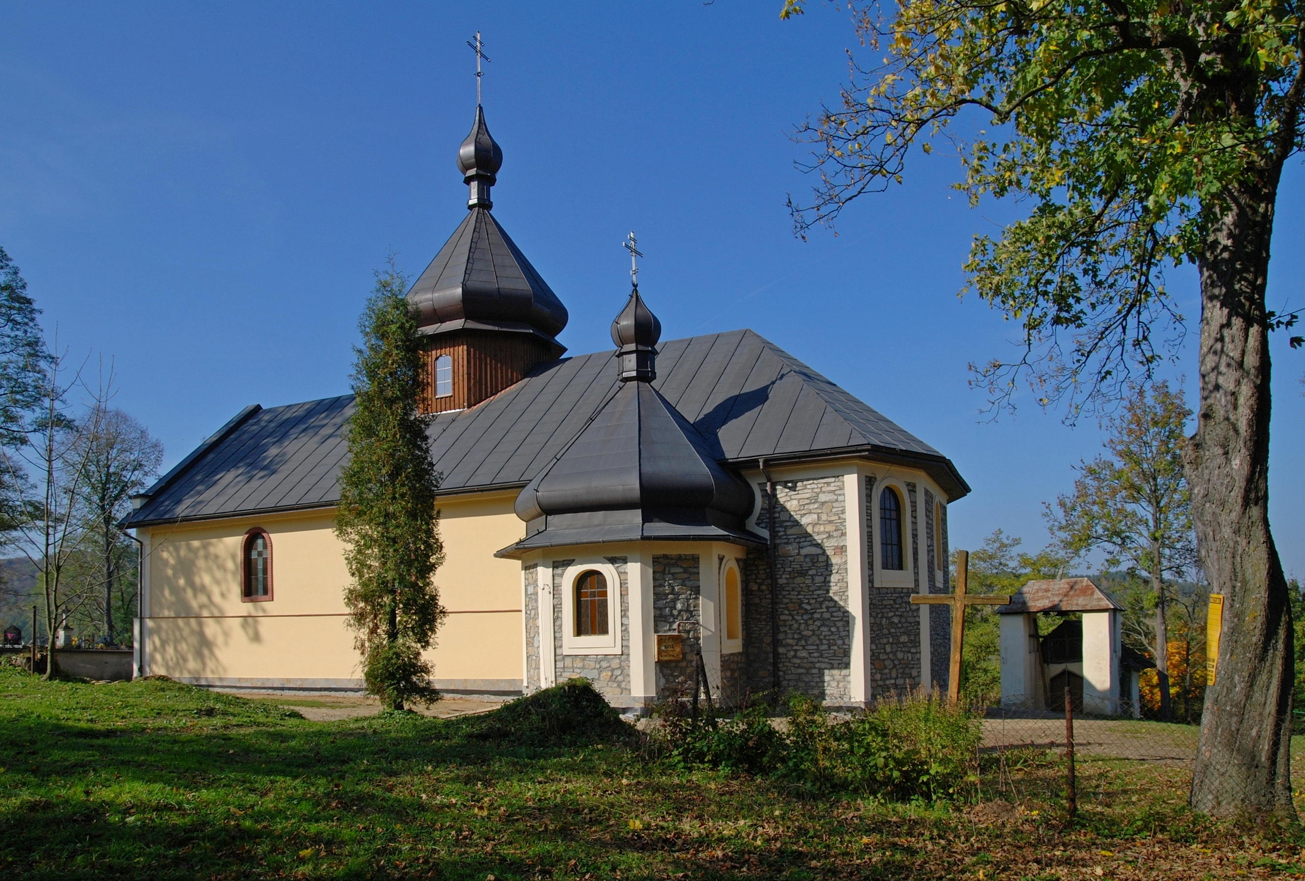 wieś Olszany (województwo podkarpackie)